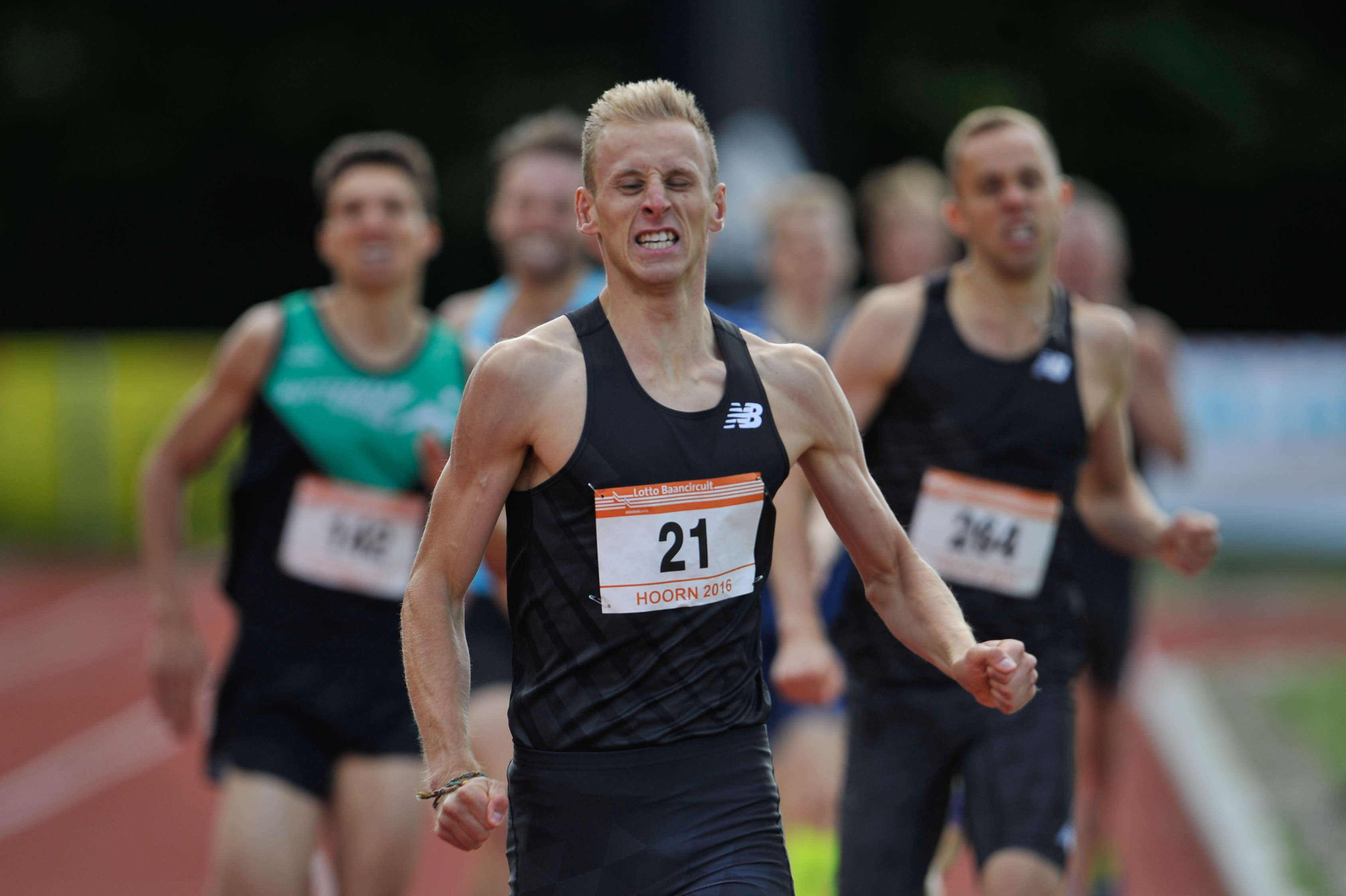 Richard Douma in actie tijdens de jaarlijkse recordwedstrijden in Hoorn in 2016.